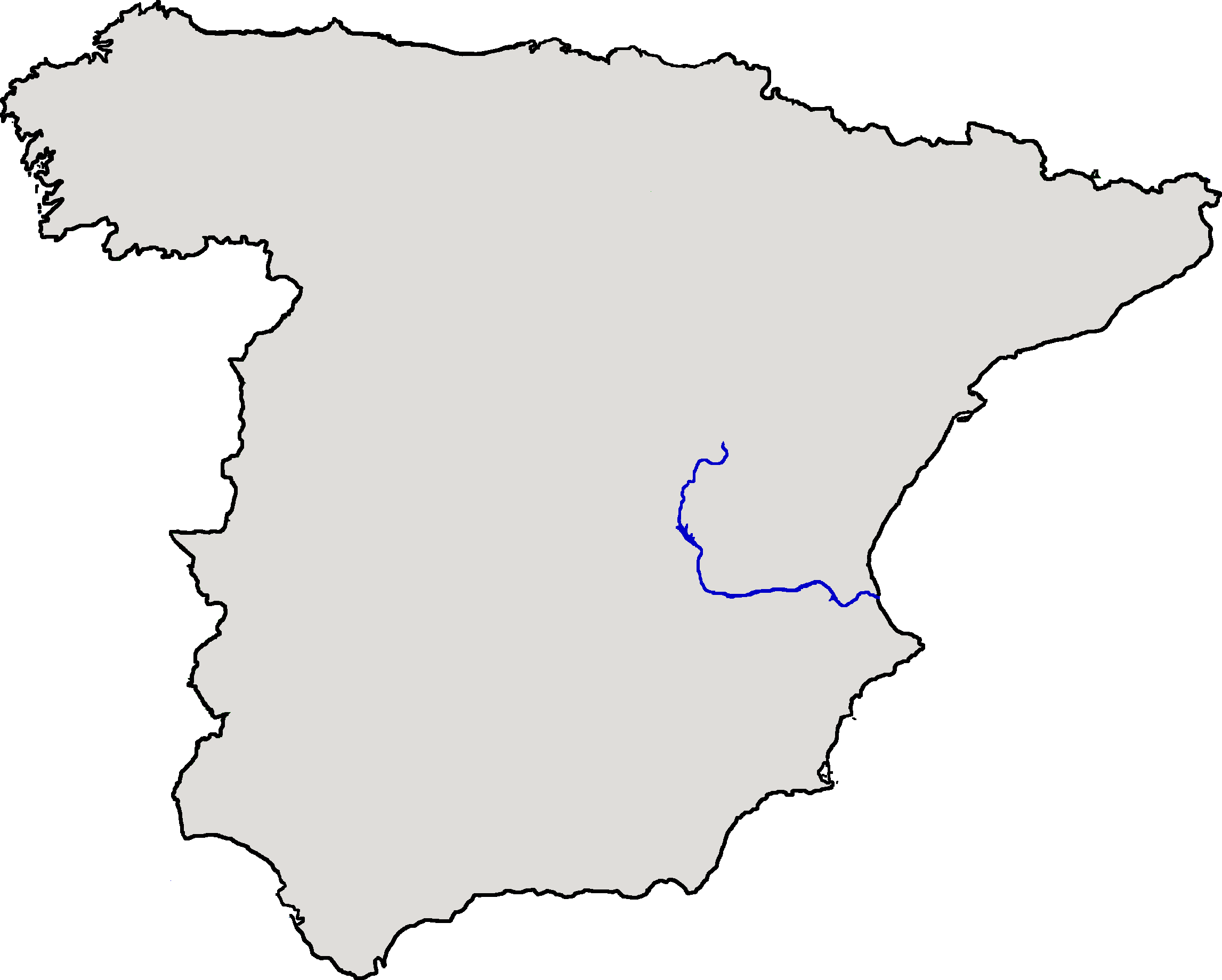 Localización del río Júcar respecto de la España peninsular